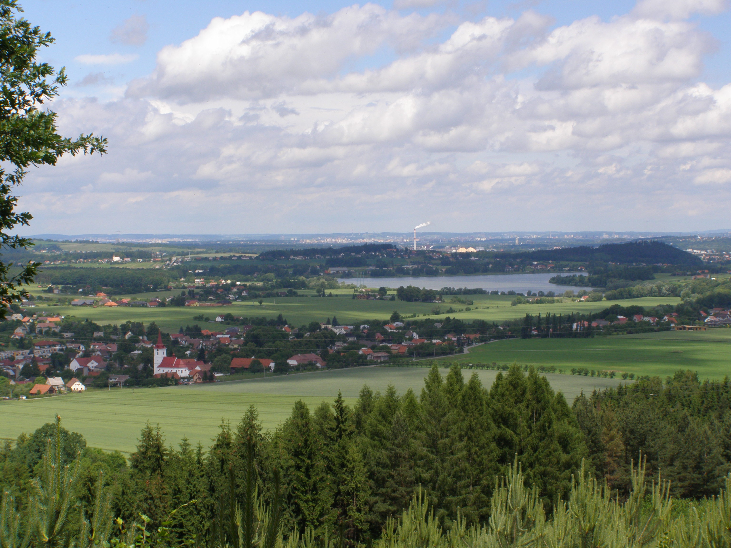 Palkovické podhůří, východní část, vlevo obec Palkovice, vpravo vodní nádrž Olešná, v pozadí Ostravská pánev, pohled z jihu